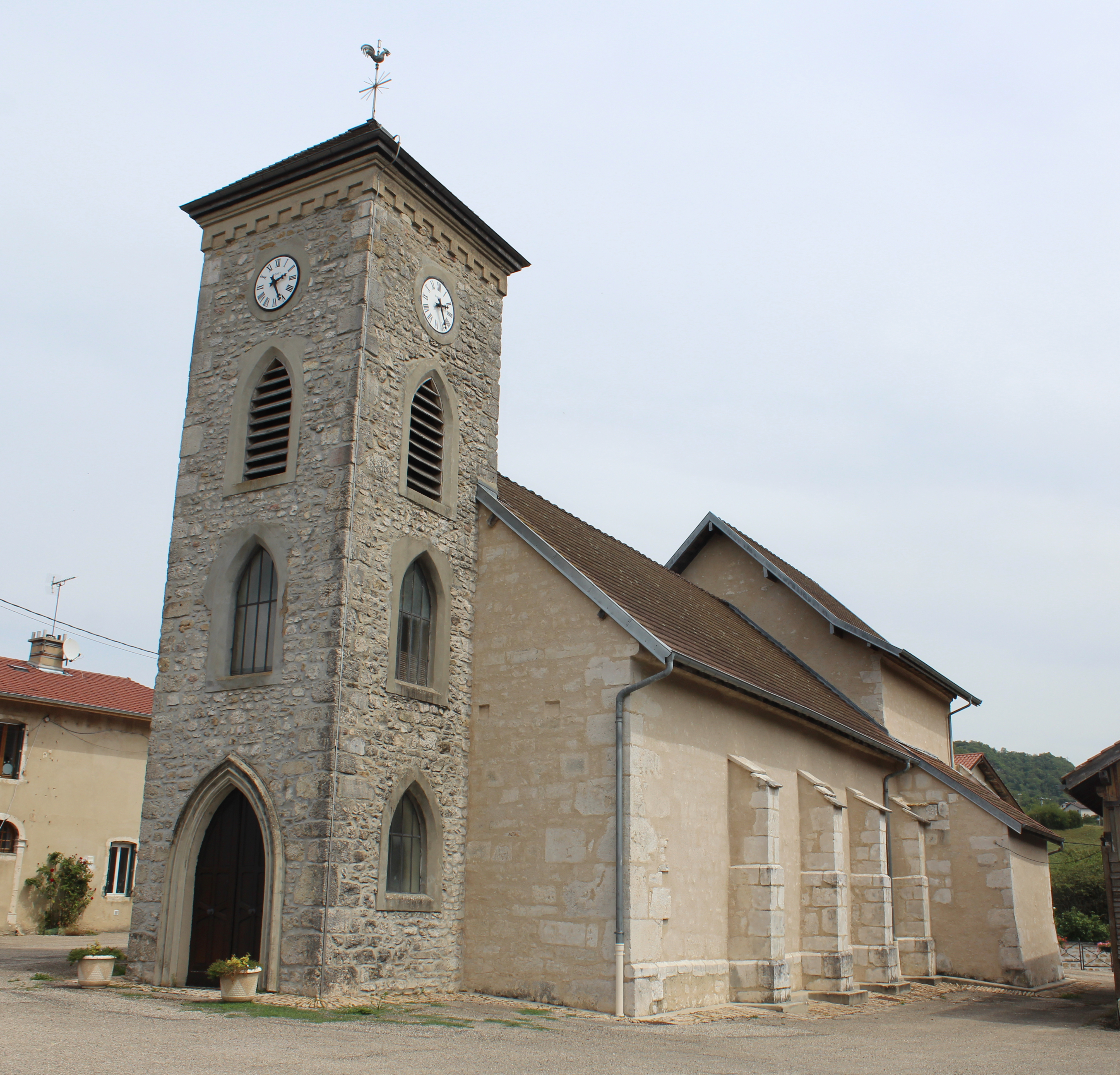 Église Saint-Barthélemy de Samognat.